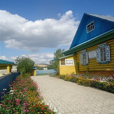 Башҡортса: Ишембай районы Көҙән ауылындағы Зәки Вәлиди музейы.